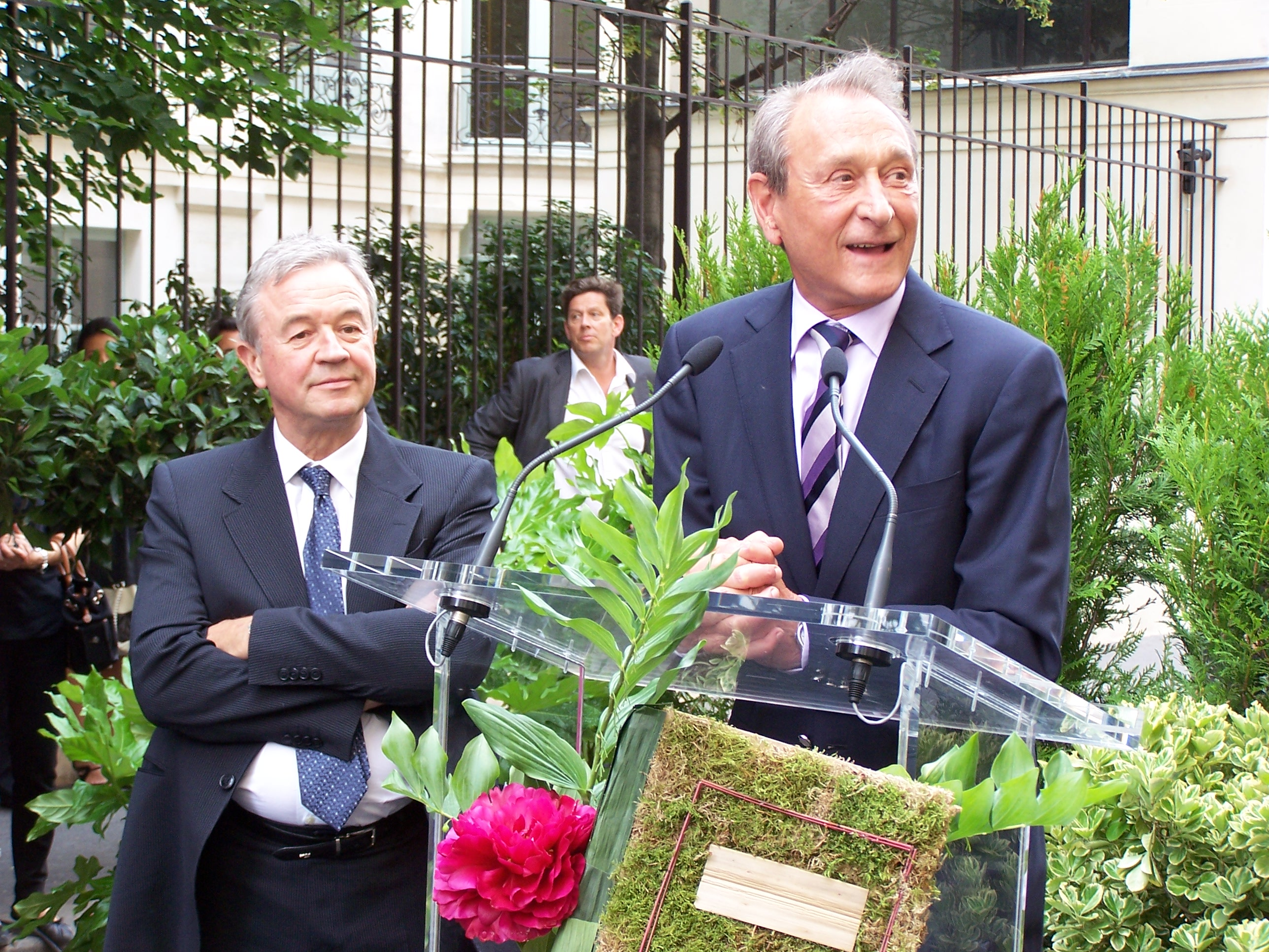 Inauguration de la rue Gaston-Gallimard discours du maire Bertrand Delanoë avec à ses côté l'éditeur Antoine Gallimard